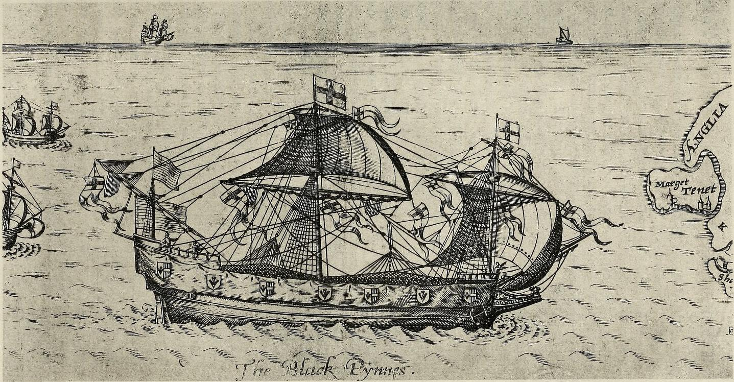 Das Schiff die "Black Pinnace" bringt 1585 den Leichnam von Sir Philip Sidney von Vlissingen nach London